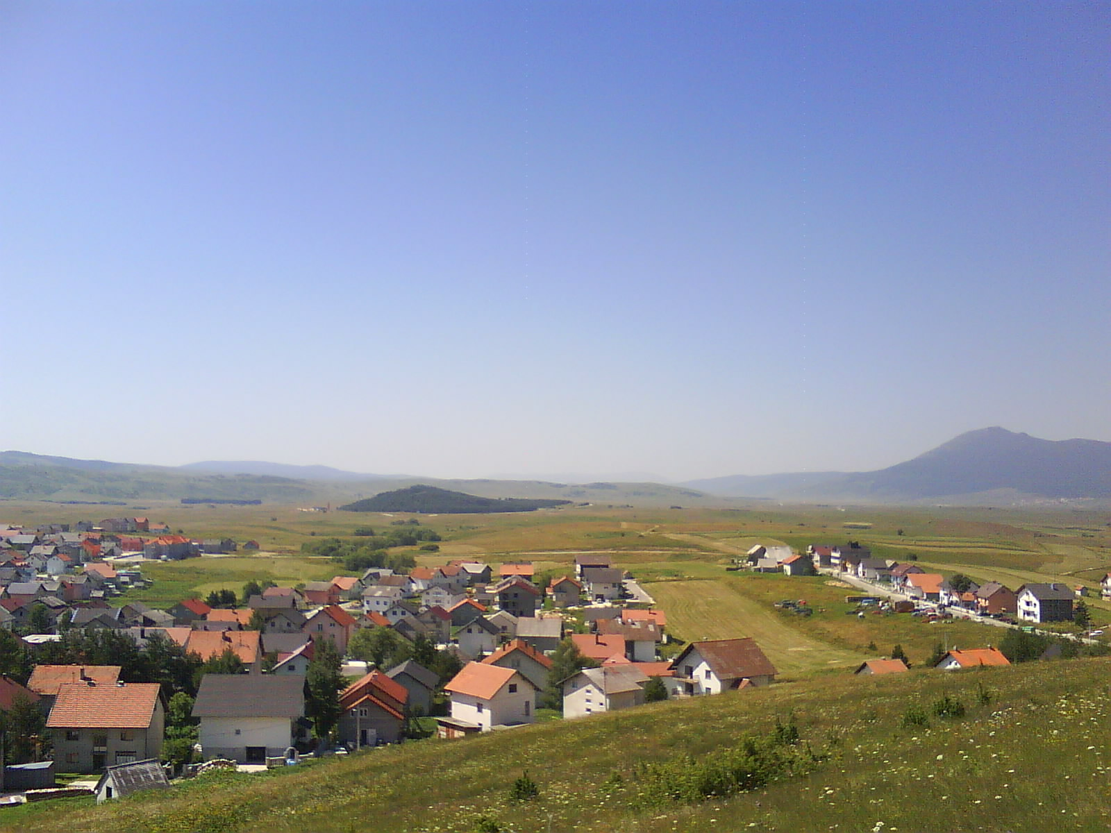 Kupres